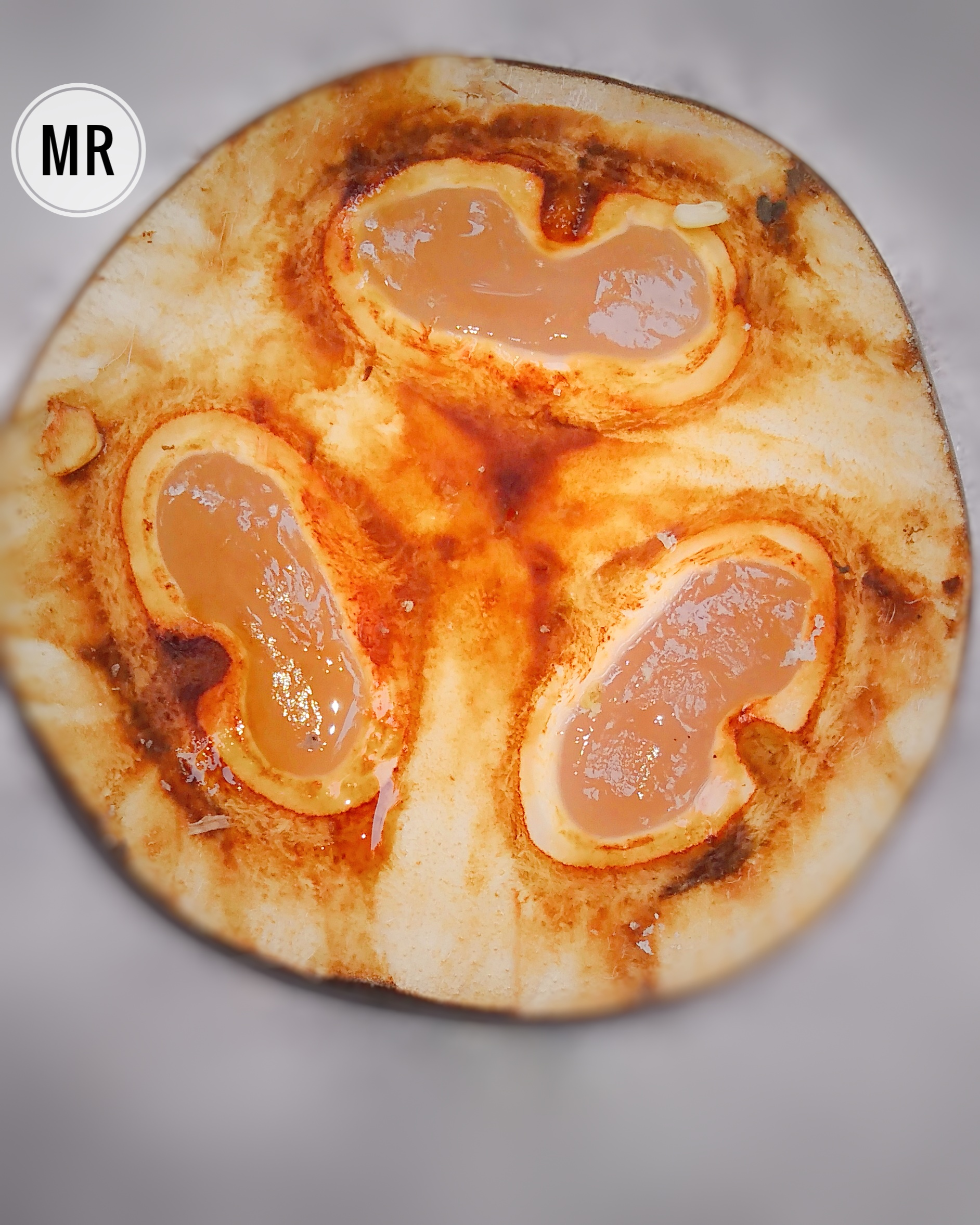 అమలాపురం లో తాటి ముంజలు